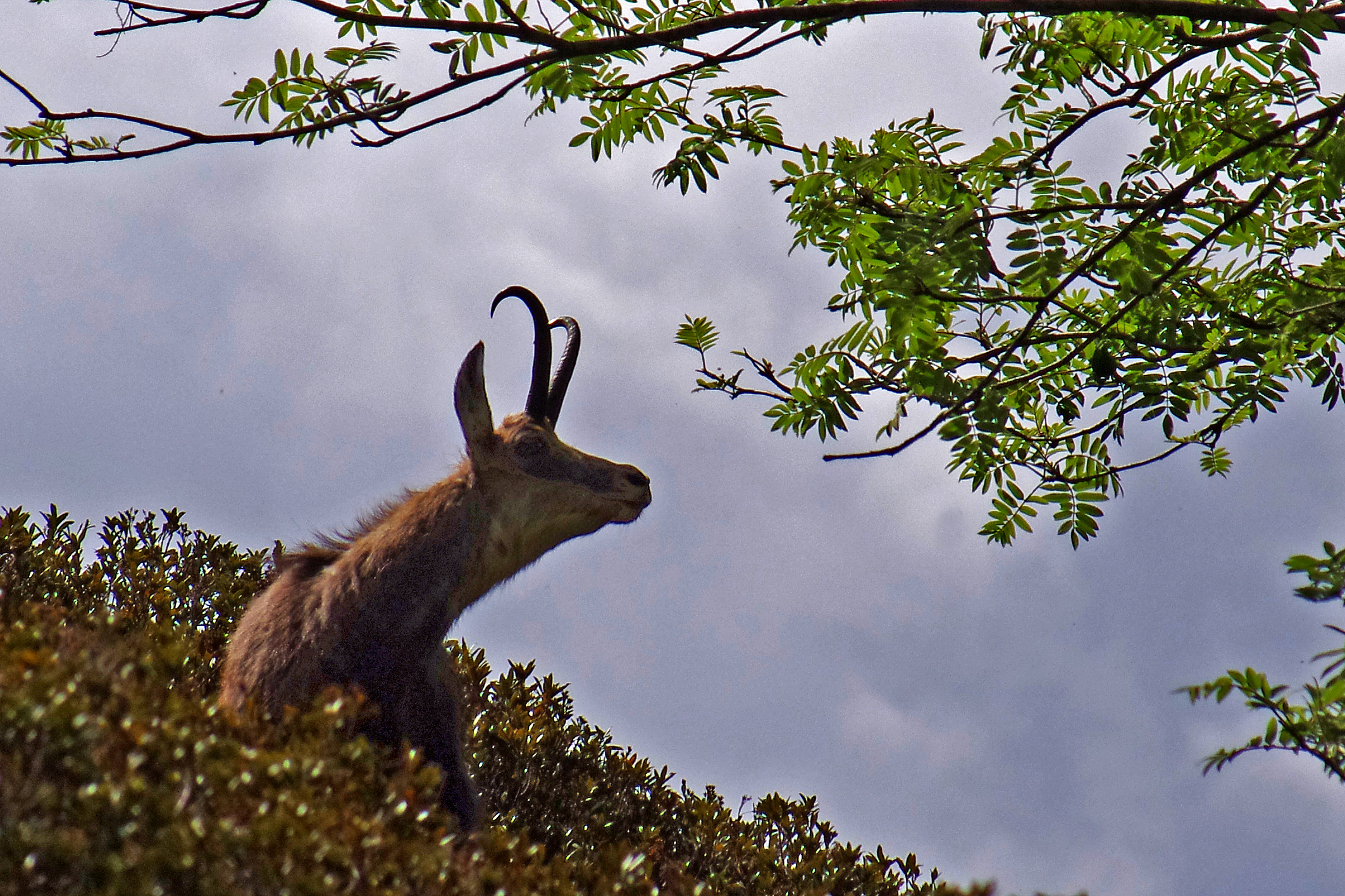 Chamois surpris sur les pentes du vallon de Valsenestre dans le parc des Ecrins.